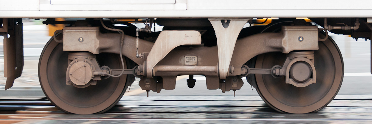 京成3000形の住友金属FS064形台車。